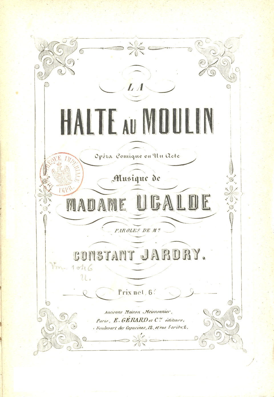 Constant Jardry & Delphine Ugalde, La Halte au moulin (opéra comique), 1868.